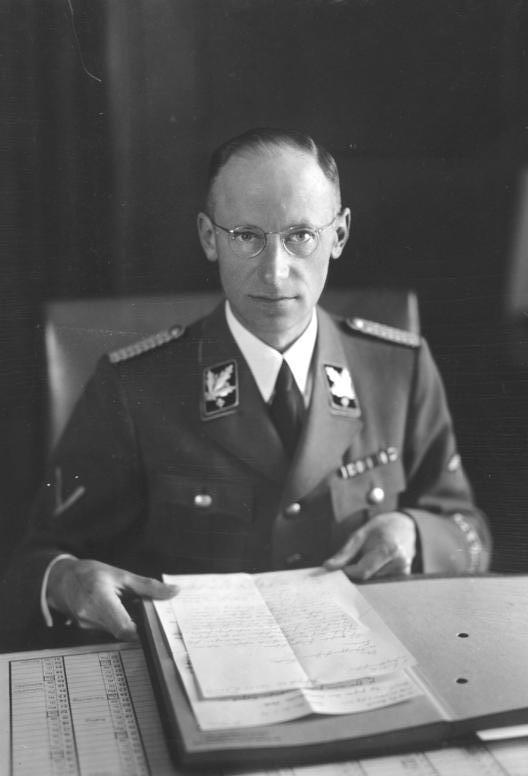 Herbert Backe Staatssekretär Herbert Backe (Porträt) Abgebildete Personen: Backe, Herbert: Reichsminister für Ernährung und Landwirtschaft, NSDAP, Deutschland